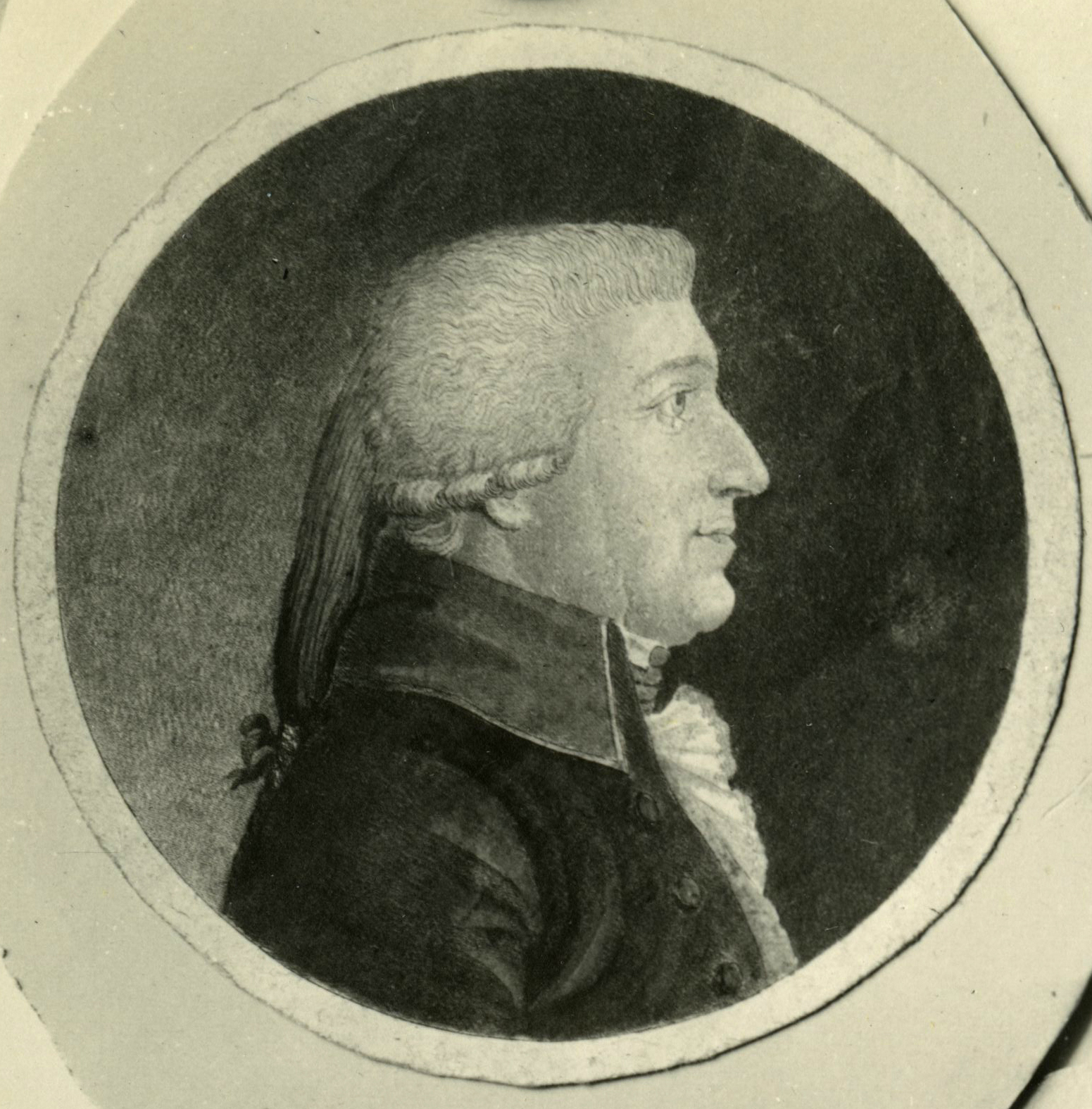 Format: Fotopositiv Dato / Date: 1897 (avfotograferingen) Fotograf / Photographer: Erik Olsen (1835 - 1920) Sted / Place: Trondheim Store Norske Leksikon: Slekten von Krohg Eier / Owner Institution: Trondheim byarkiv, The Municipal Archives of Trondheim Arkivreferanse / Archive reference: Tor.H41.B45.F3293 Merknad: Fra utstillingen i anledning Trondhjems 900-årsjubileum i 1897. Utstillingstekst i Trondhjems 900 Aars Jubilæum: Katalog for Den Historiske Udstilling i Trondhjem 1897: 466-468. Krohg, Nicolai Fredrik, f. 1732 paa Nitteberg i Gjerdrum, d. 1801; Oberst, Generalveimester i Trondhjems og Bergens Stifter 1768-1801. Søn af Oberstløitn. v. Søndenfjeldske Dragonsregiment Christian Nielsen Krohg, f. 1693, d. 1752. G. 1768 med Anna Meincke, næstældste Dtr. af Hilmar Meincke (No. 420). Høit fortjent af Veivæsenets Udvikling, idet under hans Ledelse de første virkelige Veianlæg nordenfjelds blev udførte. Ofte udredede han til Anlægsomkostningerne af egen Kasse de nødvendige Forskud, hvilke det hyppig var vanskeligt for ham at faa refunderede, ligesom han anvendte ikke saa lidet af sine egne Midler til Veivæsenets Fremme. Veien over Stenbjerget er anlagt af ham. Var desuden fra 1771 til sin Død reisende Medlem af Overdirektionen for Røros Kobberværk. Var med at skaffe Trondhjem det første Vandværk, aabnet 1777. Kjøbte 1773 Munkvold, dengang ikke stort bedre end en Sæter, som han lod bebygge, og hvor han tog Bolig 1777; eiede ogsaa Kystad og andre Gaarde, som han alle opdyrkede og forbedrede. 466. OM., Brystbill. i fuld Størr., malet af [A.]Bergius) 1778. * ORsagfører Jens Krohg, Vaage. 467. Koloreret Kobberstik (Miniatur). * Wilh. Krohg, Kystad. 468. Silhoet, taget 1799 af Sønnen B. L. Krohg. * Den Samme.